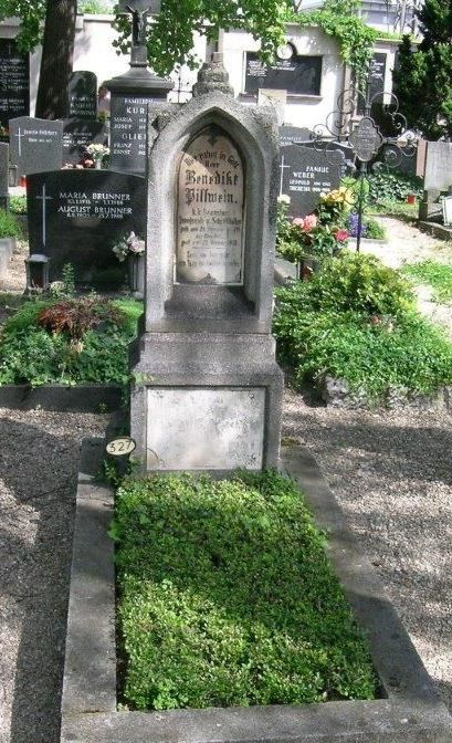 Grab von Benedikt Pillwein. Kreuz leider abgebrochen.